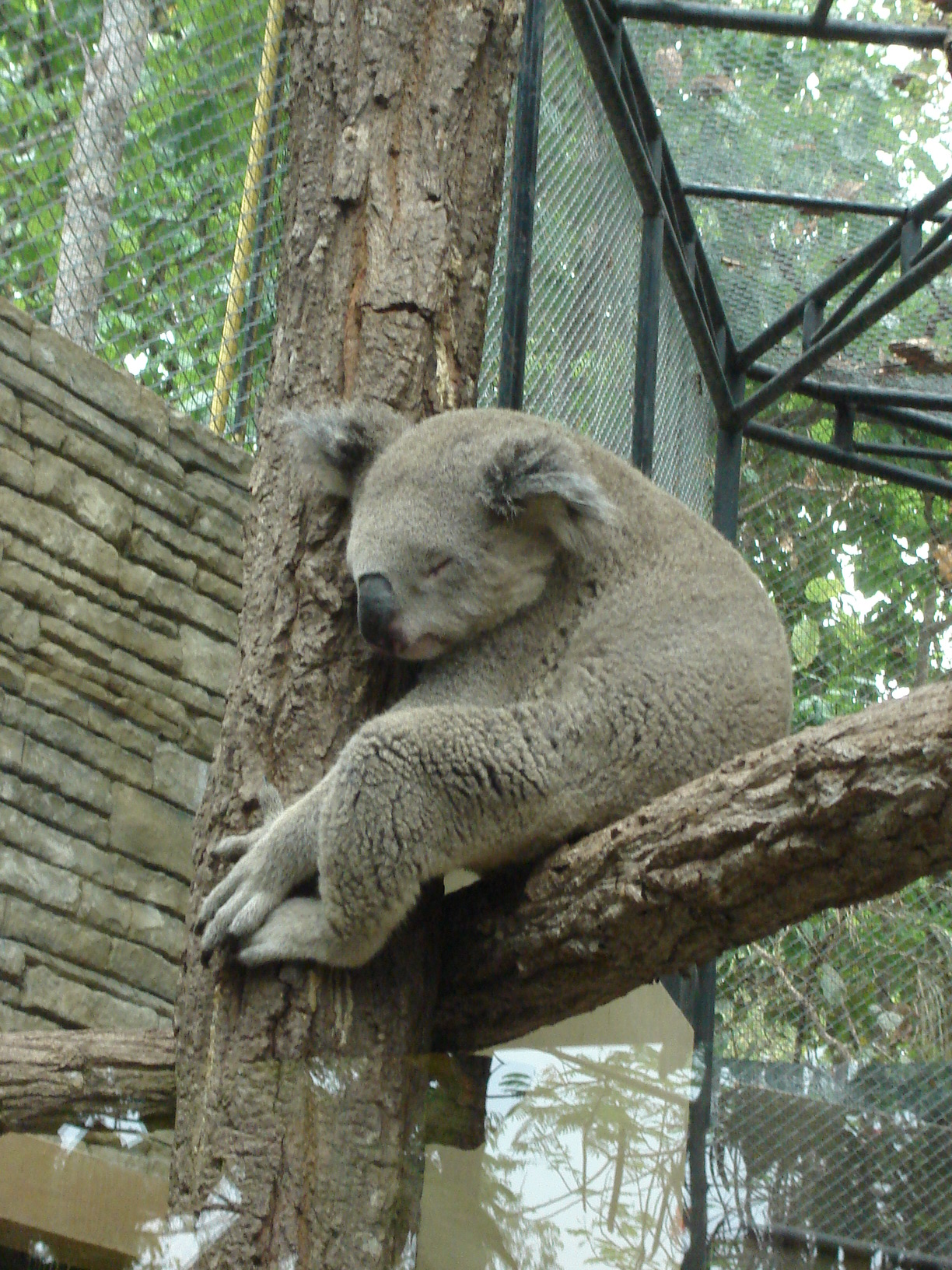 Koala in Chiang Mai zoo